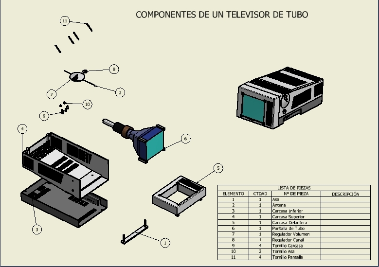 La imagen corresponde a un Televisor Antiguo y sus partes.